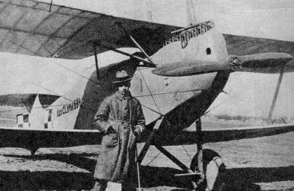 Samolot Hannover CLII, nr 8.15 zmodernizowany w CWL. Przed nim inż. Zdzisław Zych-Płodowski.